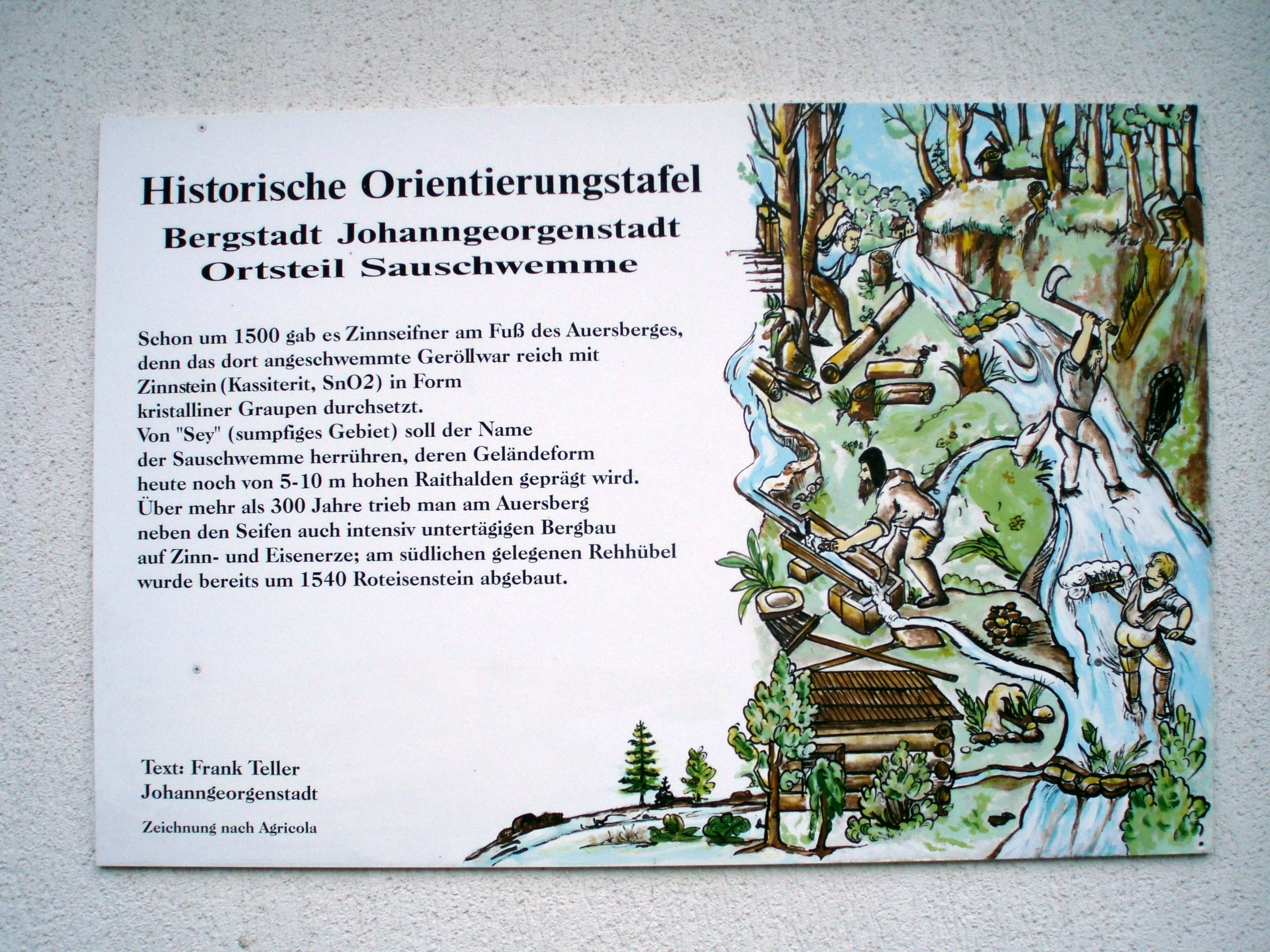 Erläuterungstafel an der Sauschwemme